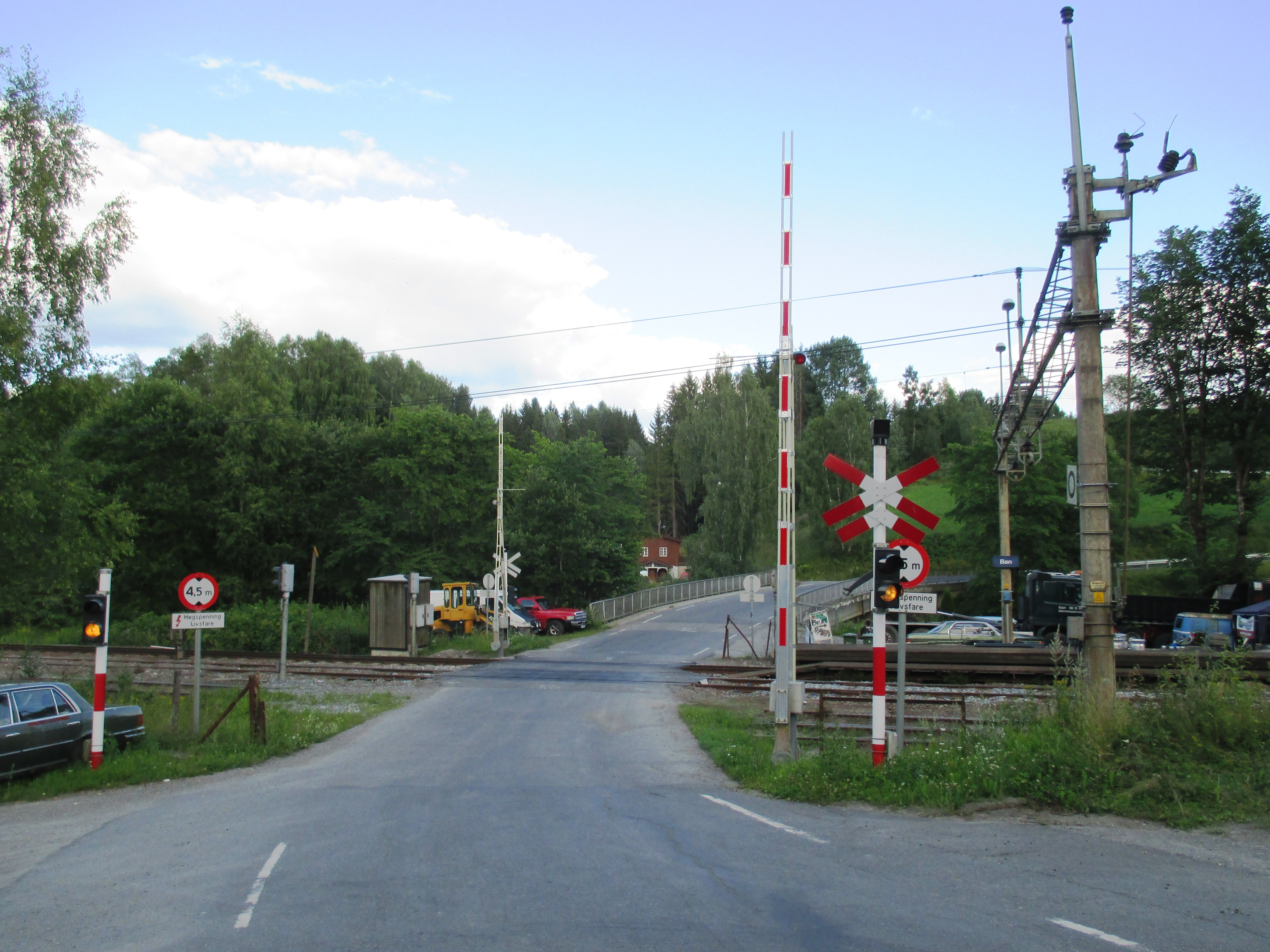 Fylkesvei 505 krysser Hovedbanen ved Bøn stasjon.